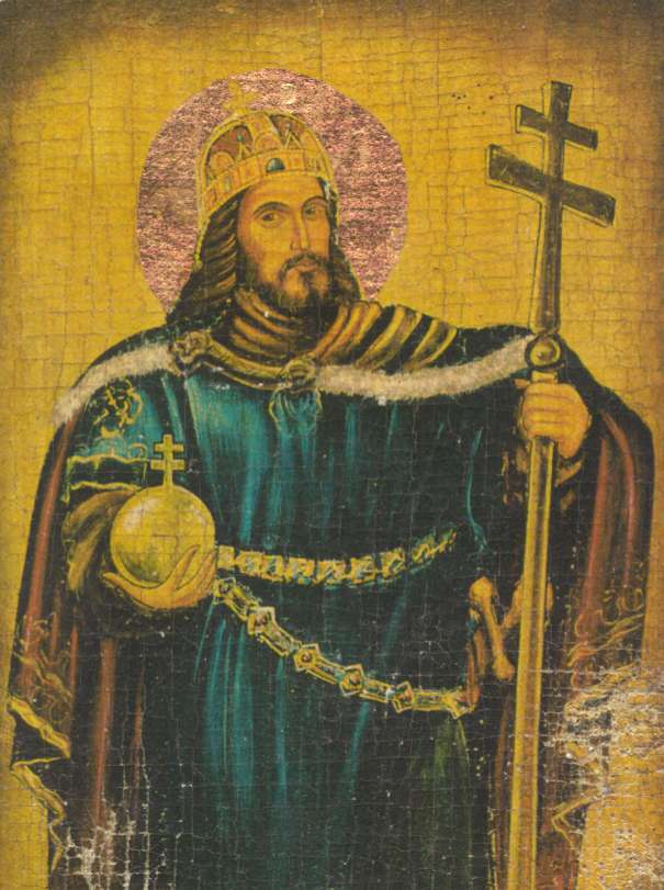 Saint Stefan